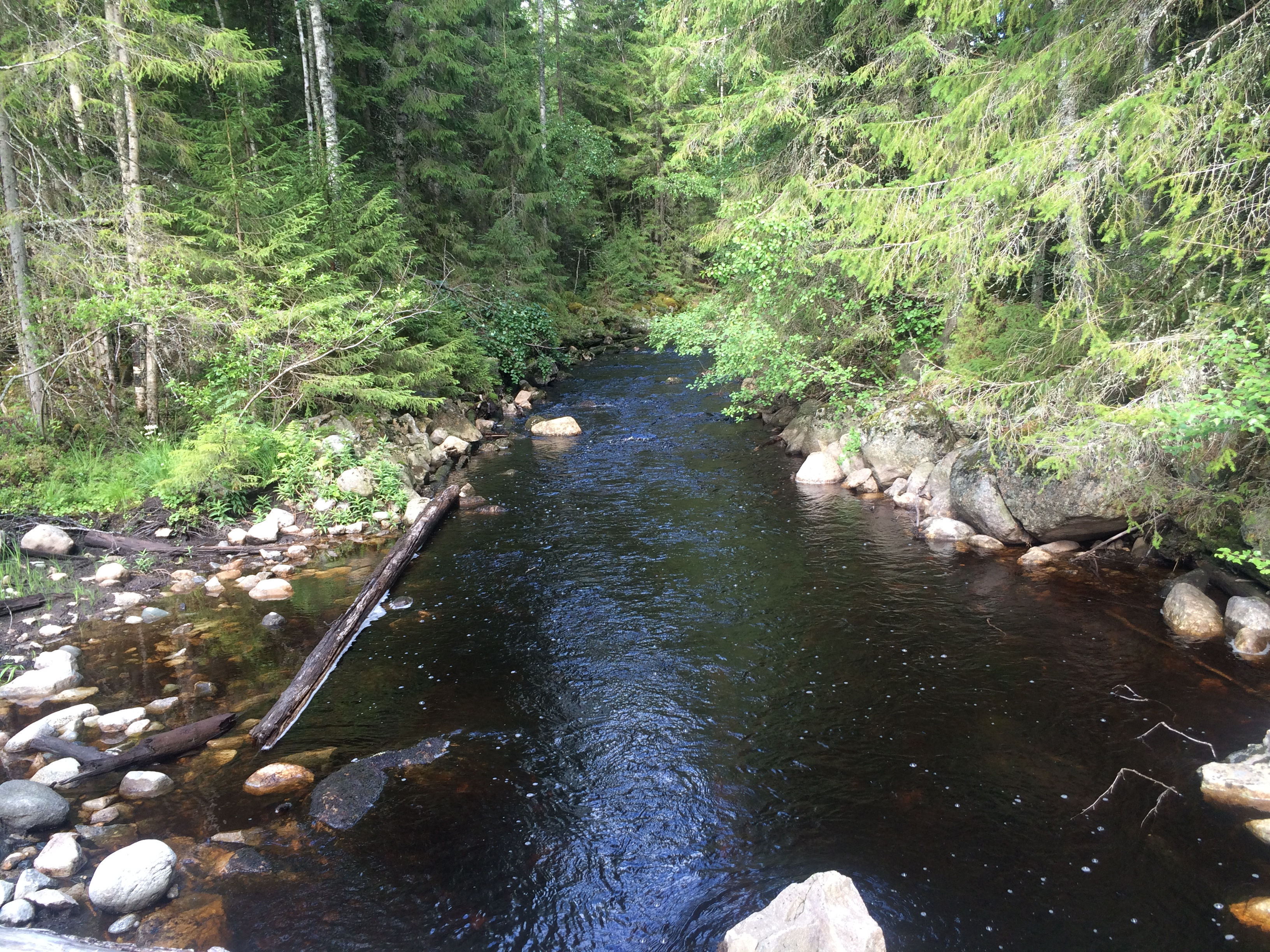 Варисйоки